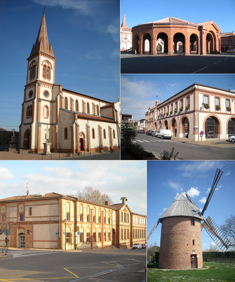 De haut en bas et de gauche à droite : L'église La halle La mairie La médiathèque Le moulin